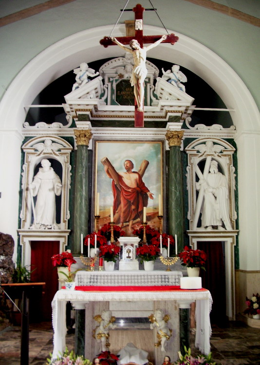 L'altare maggiore della Chiesa di Sant'Andrea Apostolo a Tirli (GR)